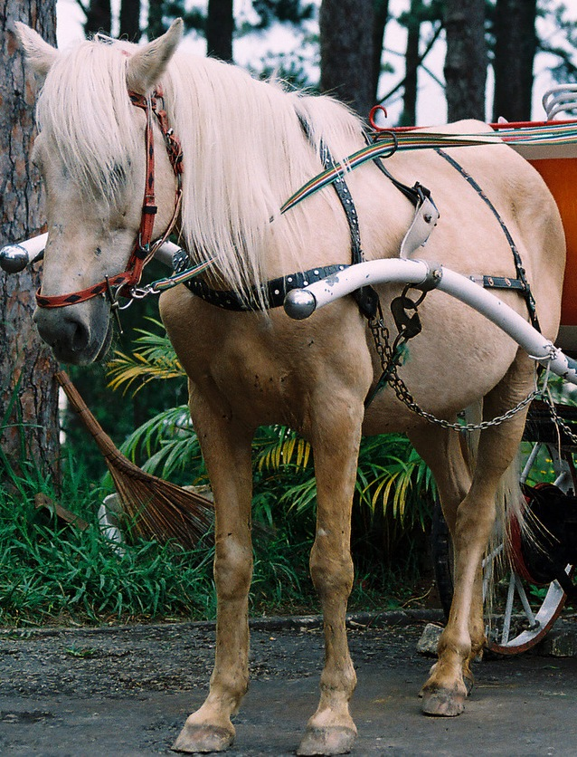 Poney vietnamien Ngua Noi